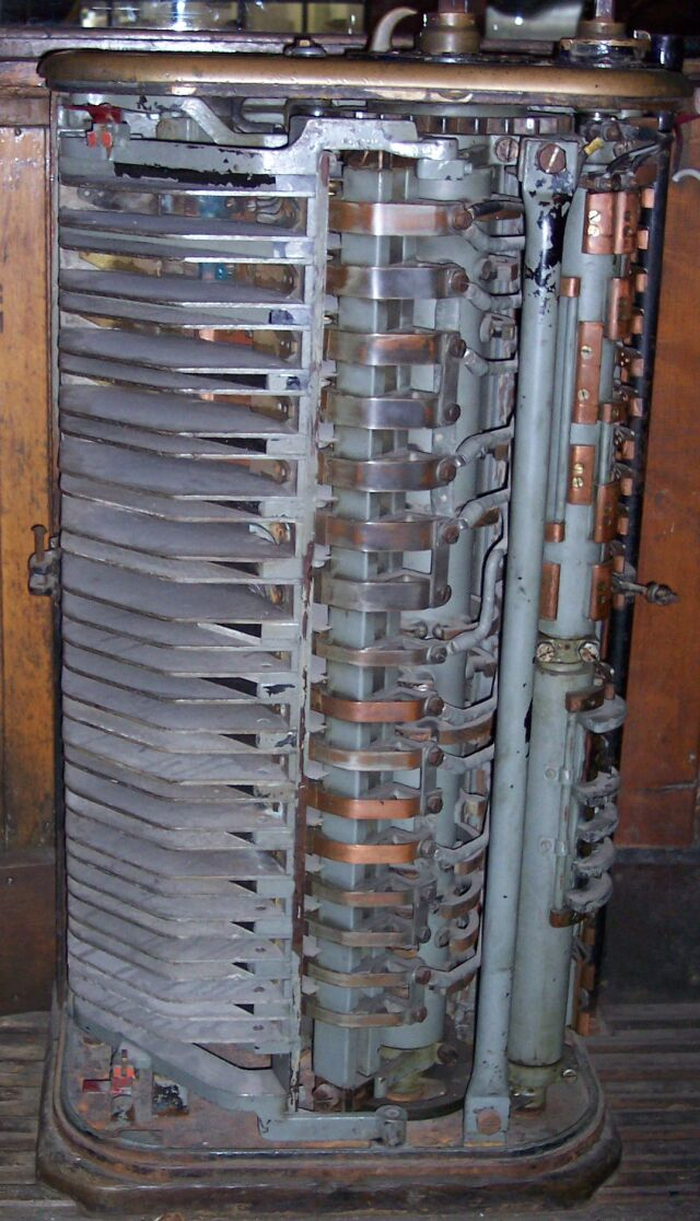 Nockenfahrschalter einer Strassenbahn